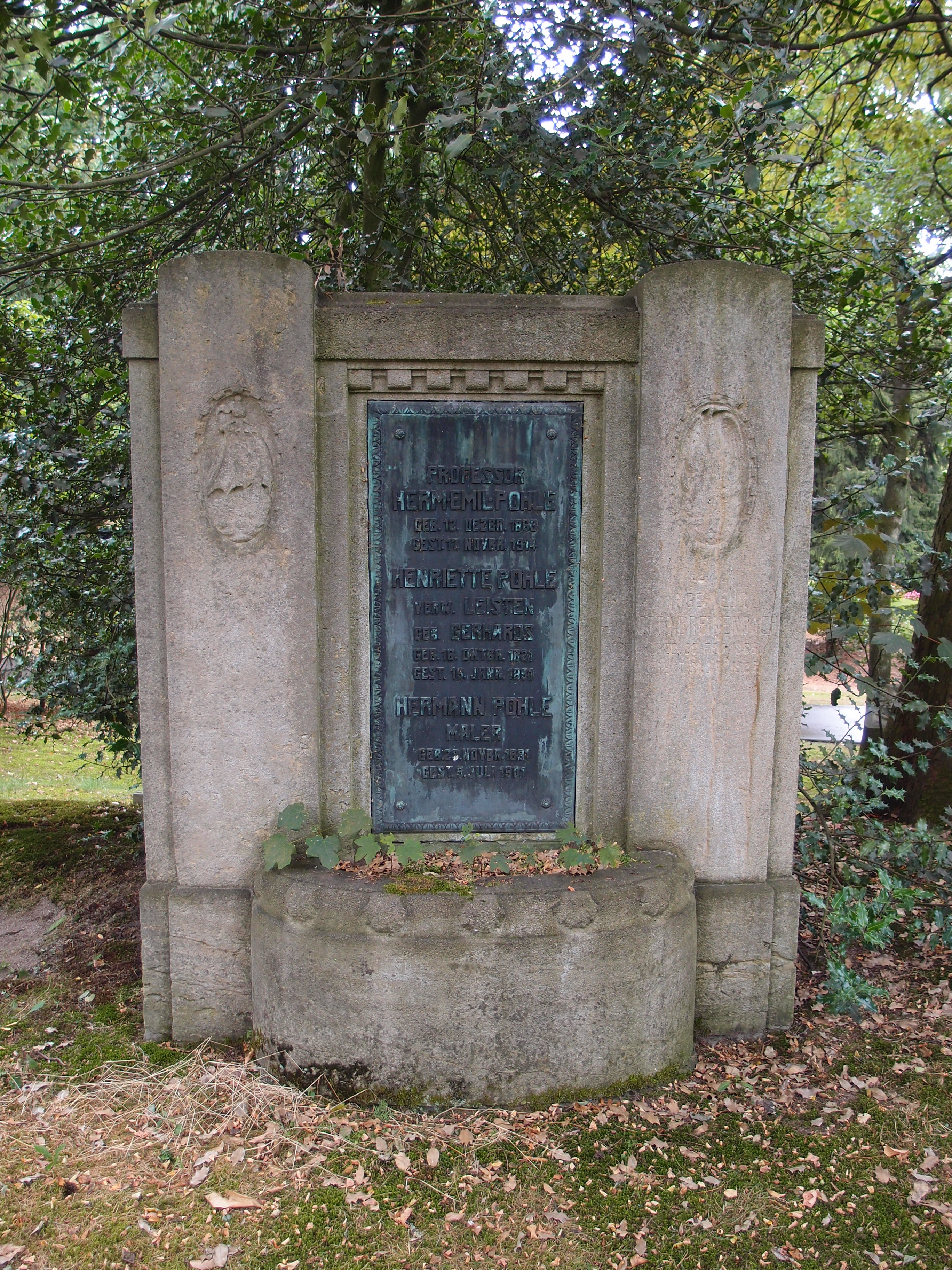 Grab der Maler Hermann Pohle (1831-1901) und Hermann Emil Pohle („der Jüngere“, 1863-1914) auf dem Nordfriedhof in Düsseldorf